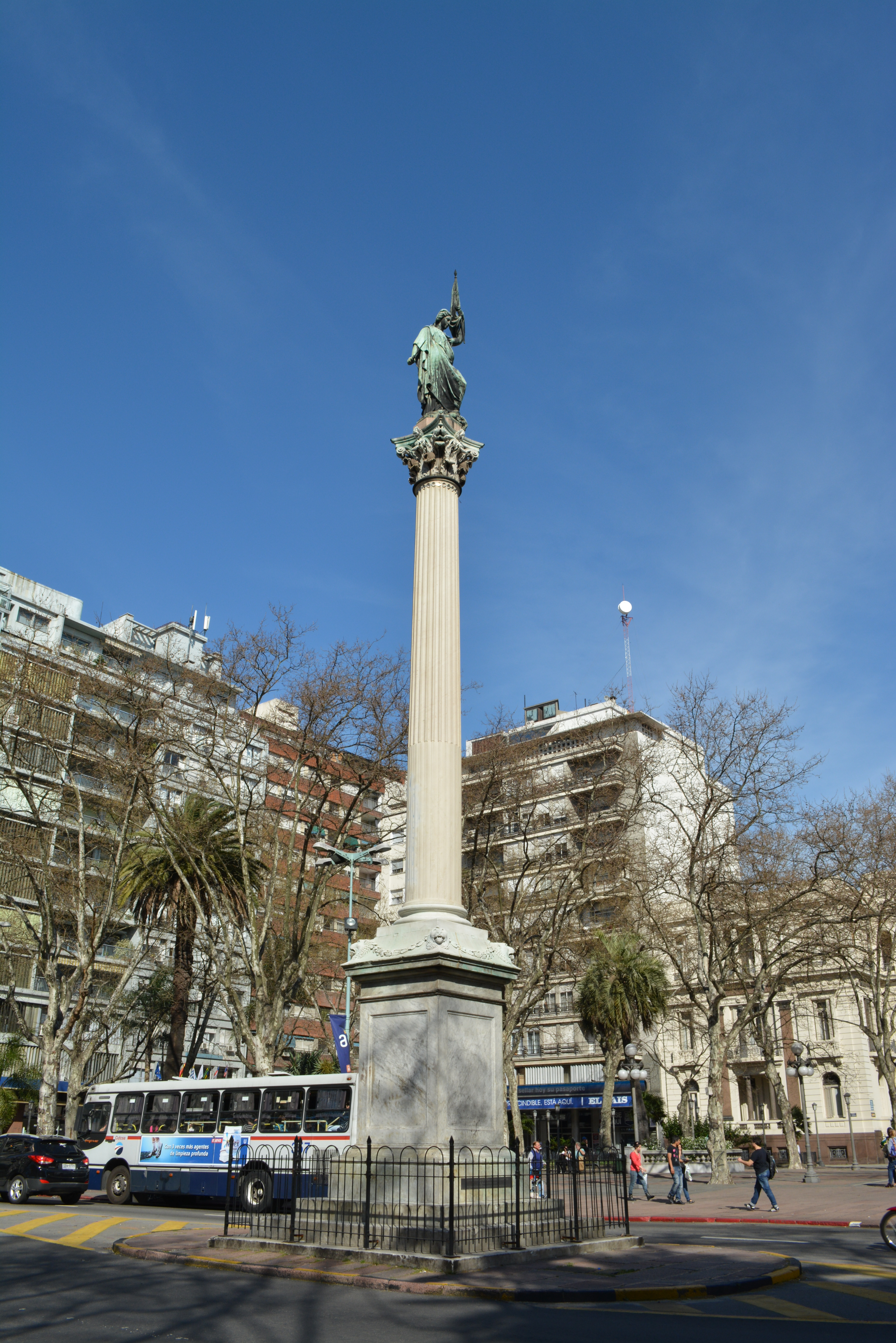 Plaza De Cagancha. Ubicada en el departamento de Montevideo